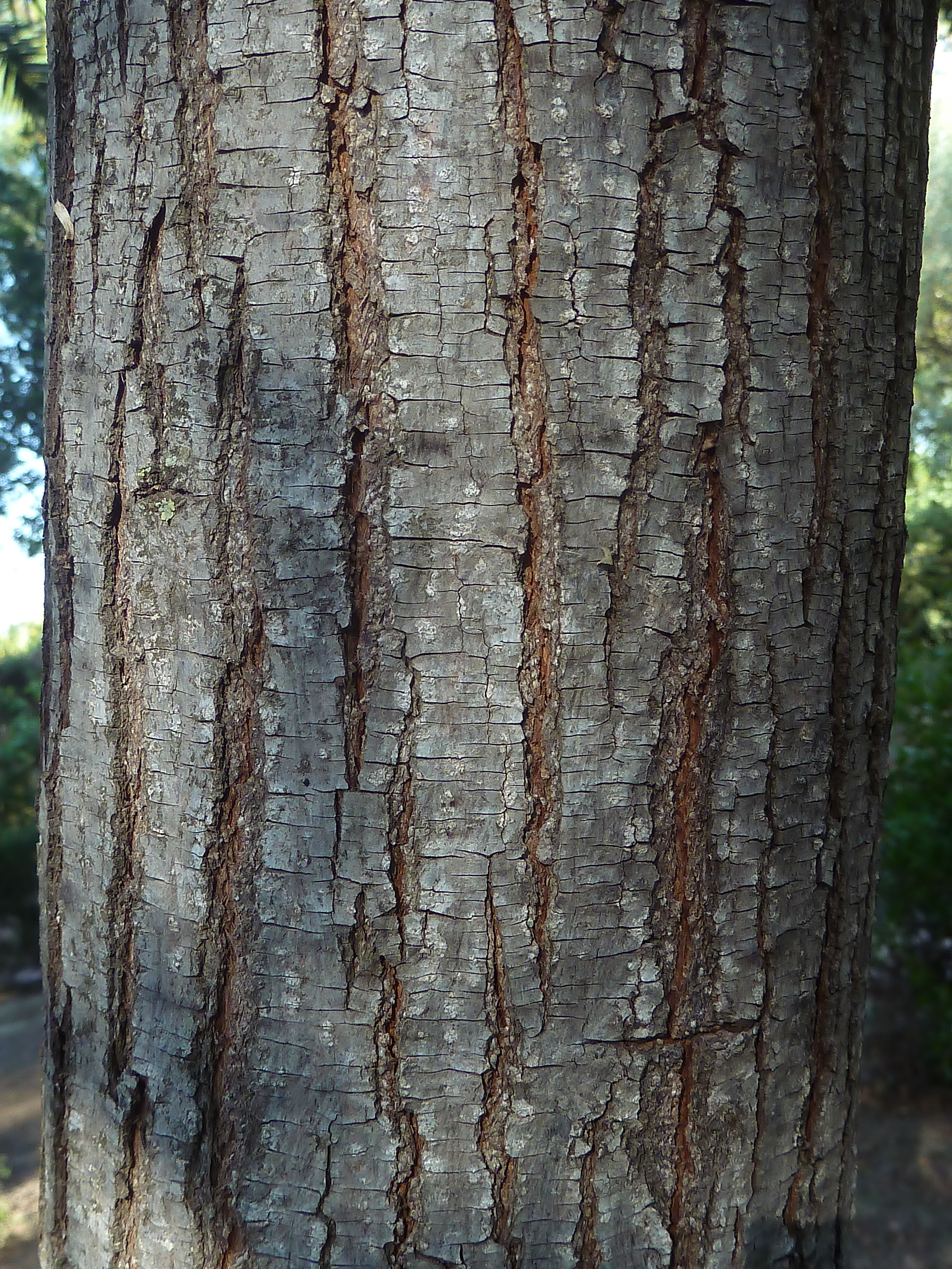 Melia azedarach (Cinamomo) - Corteza de un individuo adulto. - Ornamental/cultivado, Parque de la Huerta, Albatera (Provincia de Alicante, España).